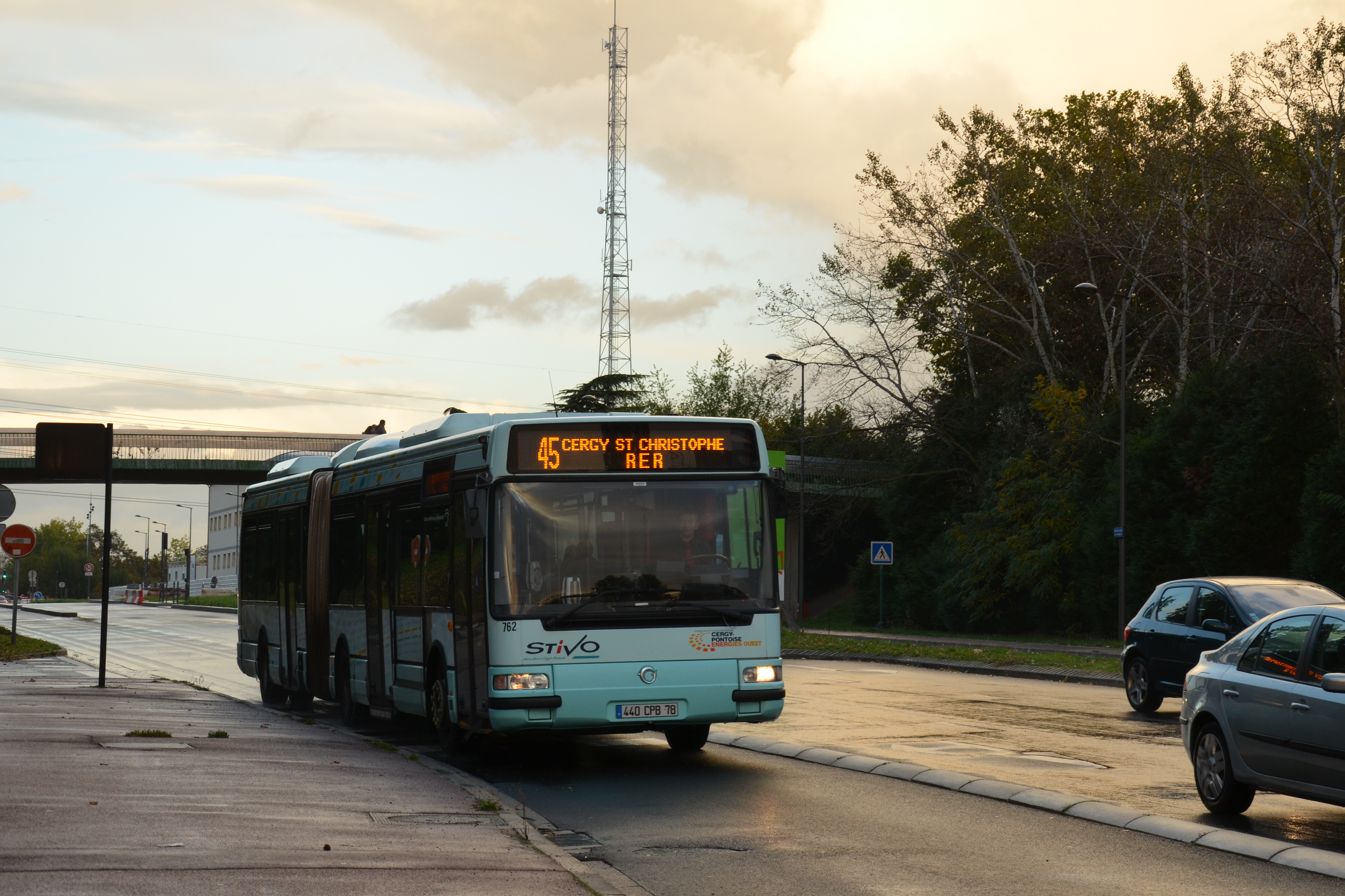 Irisbus Agora L n°762 sur la ligne 45 du réseau STIVO de Cergy-Pontoise, près du pôle multimodal de Cergy Préfecture.